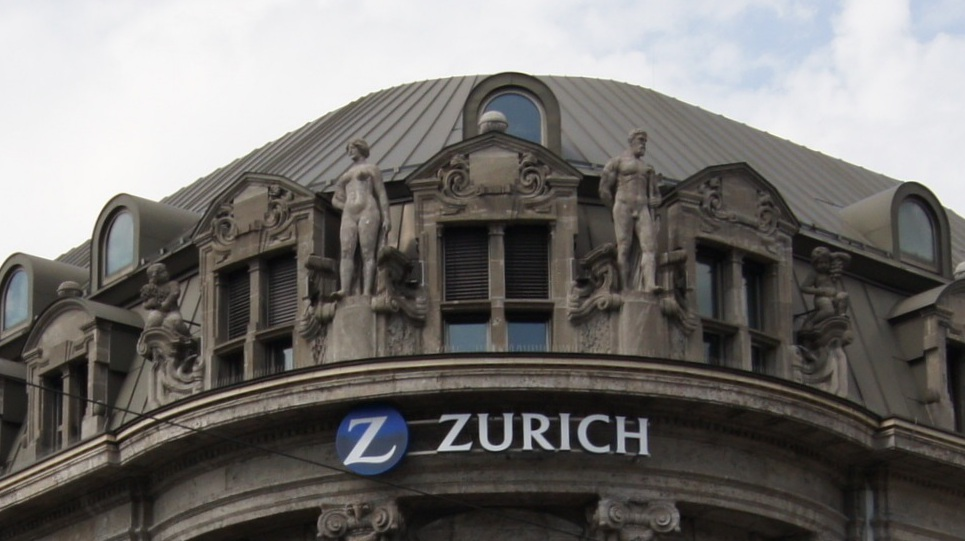 Das Dreisameck wurde 1909 von H. Schütte und W. Schneider für die Dresdner Bank errichtet. Zwischen 1977 und 1980 geriet es im Rahmen des Freiburger Häuserkampfes in die Schlagzeilen, da es abgerissen werden sollte. So wurde es ab 1981 umgebaut und die Fassade erhalten. Nachdem das italienische Konsulat ausgezogen war wurde es zwischen 2013 und 2015 erneut umgebaut und u. a. die Passage entfernt. Hier im Detail die von Hundrieser geschaffenen Figuren, die Rhein und Donau symbolisieren sollen